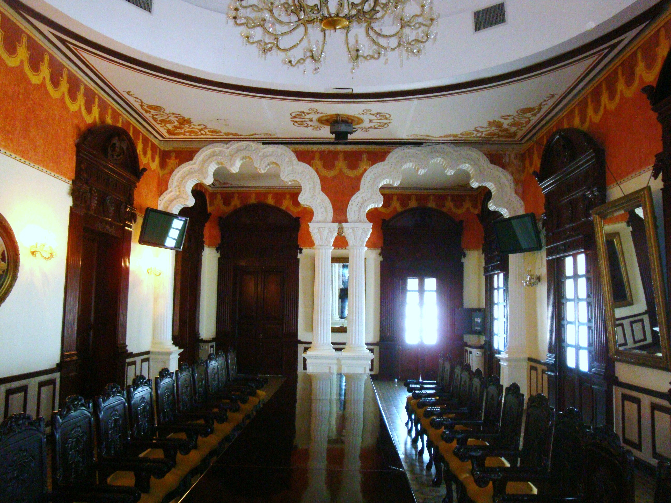 Otro aspecto del "Salón de Recepciones". Palacio de Gobierno de Tabasco. Villahermosa, Tabasco, México.